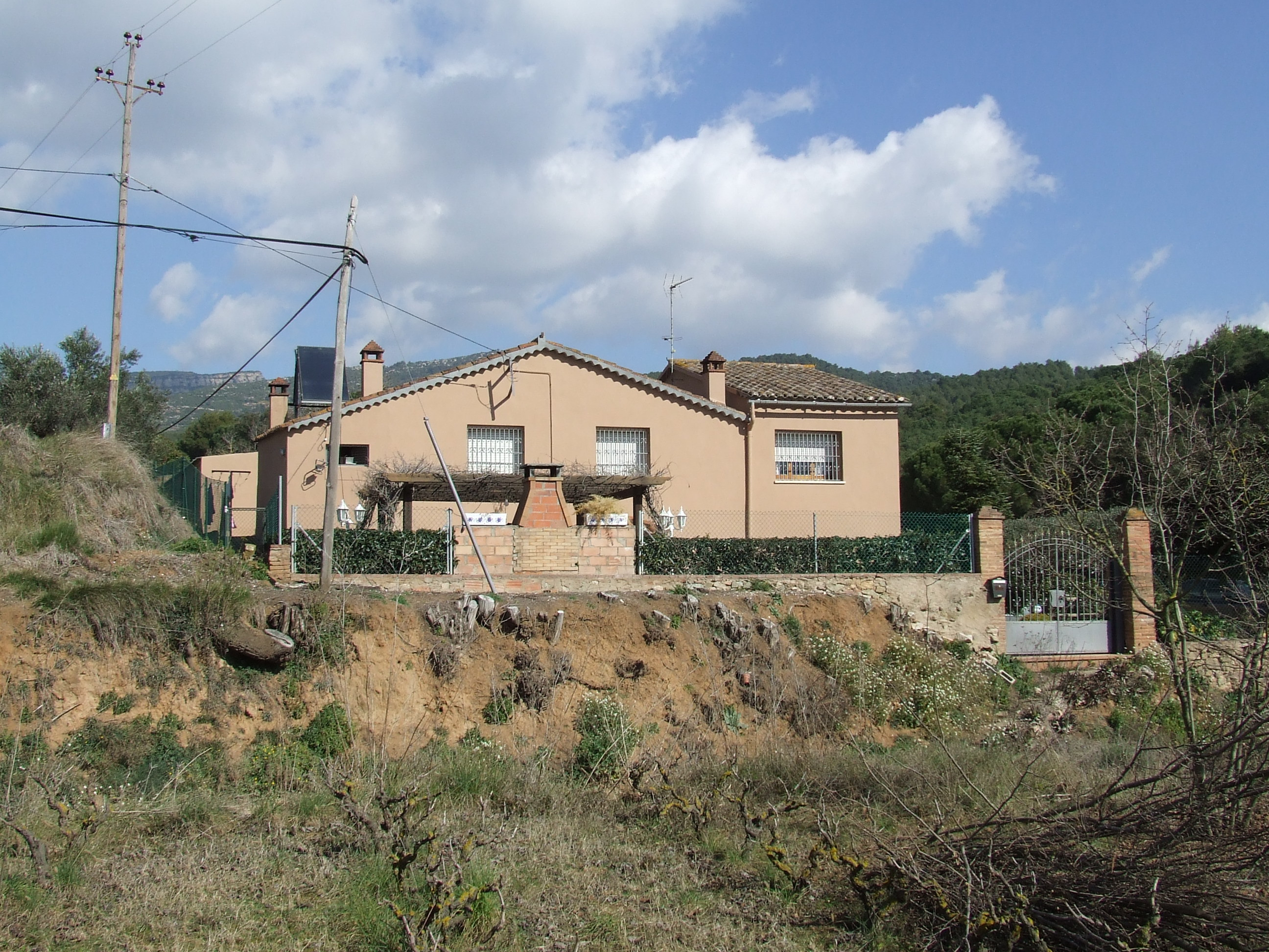 La masia de Can Benet Vell, o del Salt de la Núvia (Bigues, Bigues i Riells, Vallès Oriental)